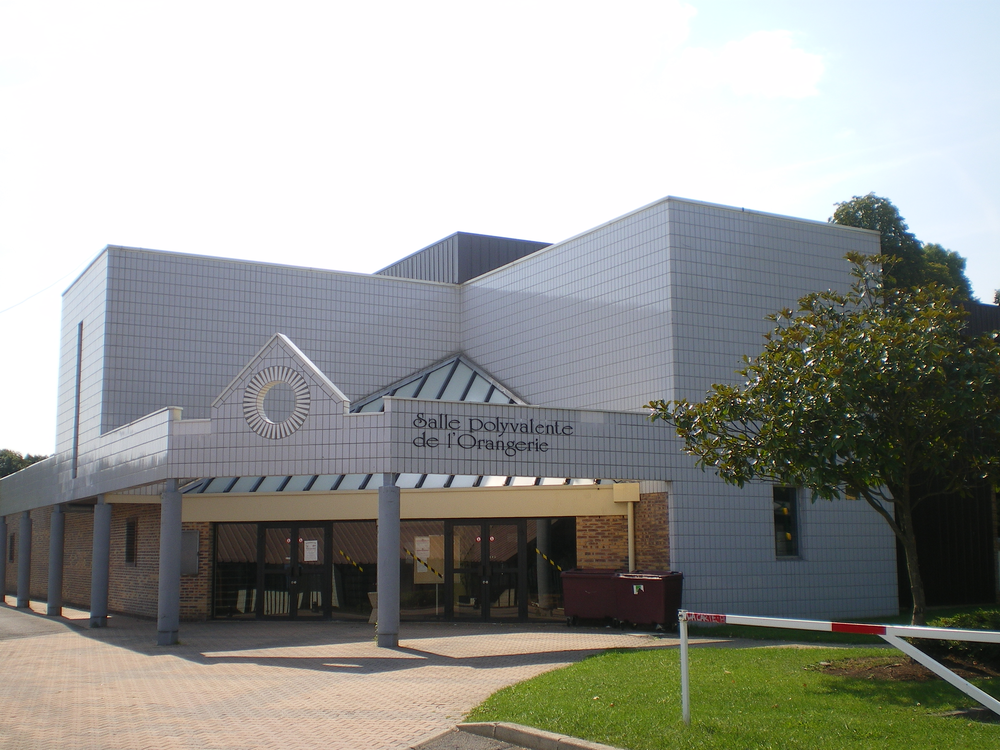 Salle Polyvalente de l'Orangerie, Croissy-Beaubourg, allée du Bois.